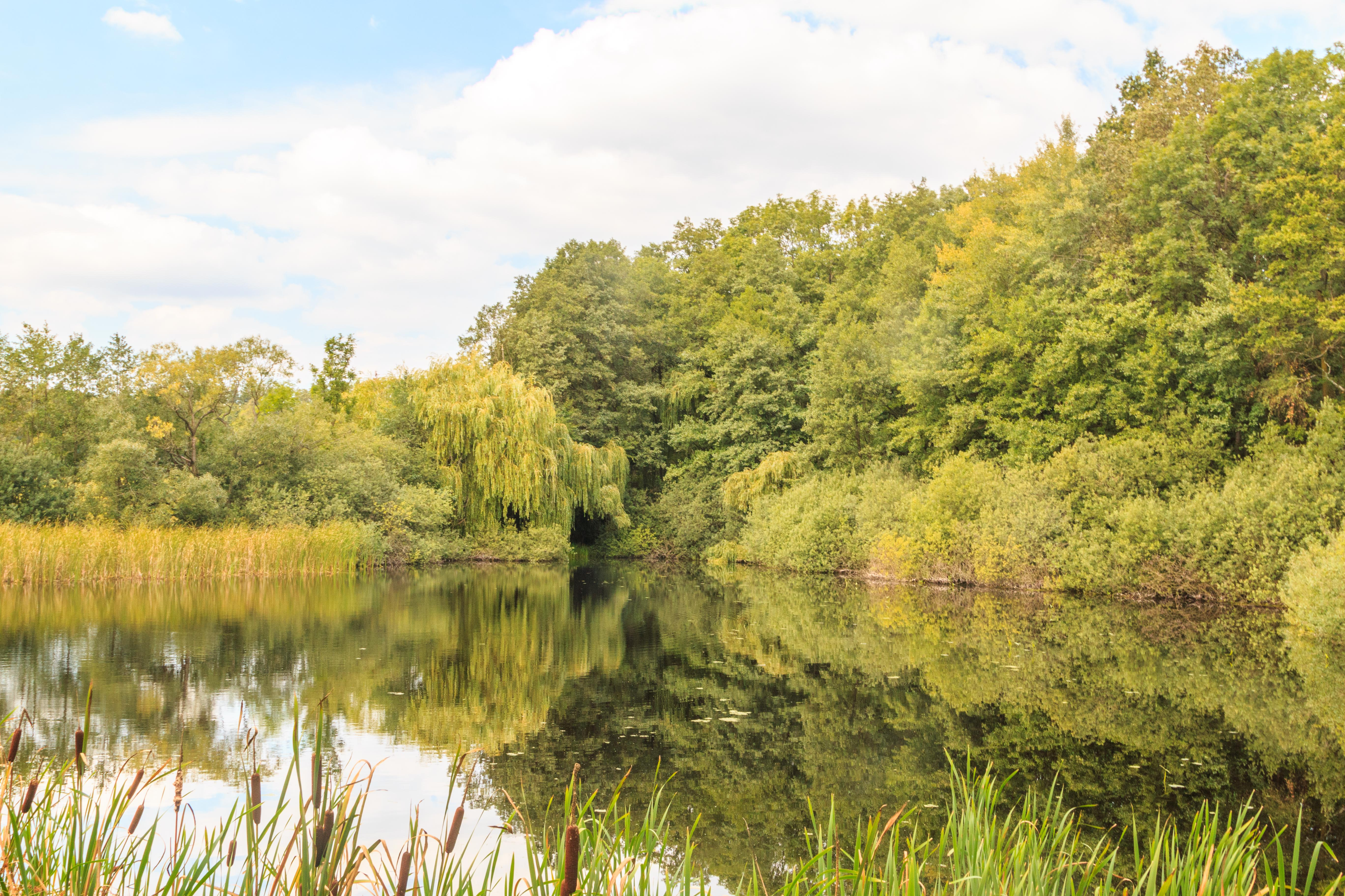 Rybník Komora u Hluboké